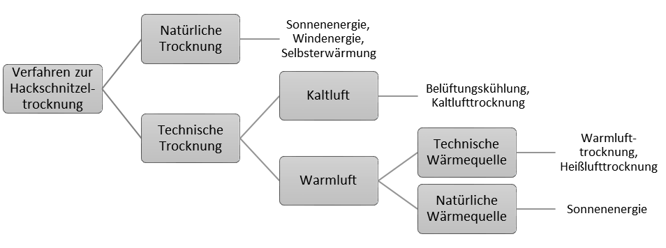 Übersicht der einzelnen Trocknungsarten